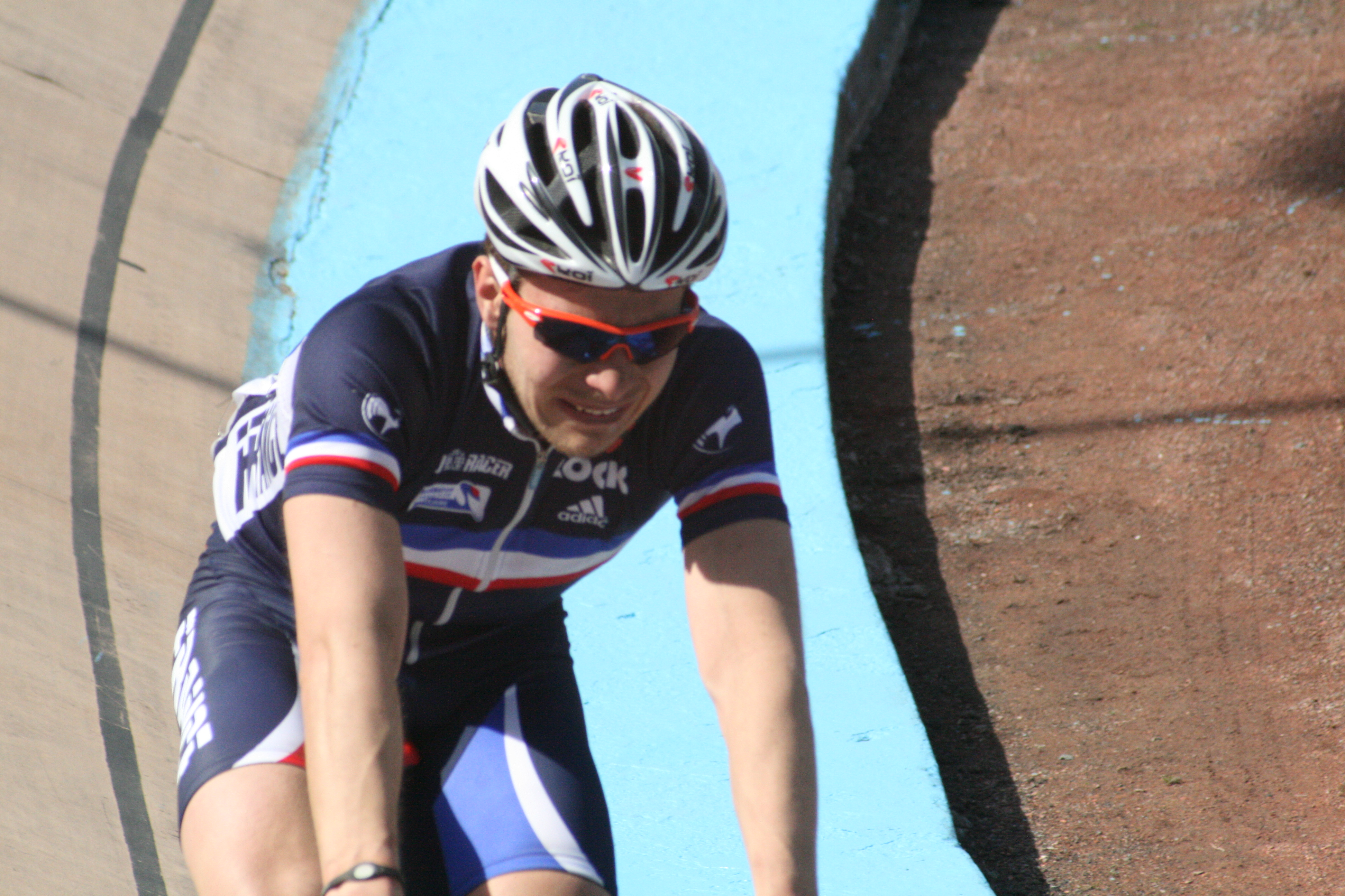 Arrivée de Paris-Roubaix 2011 au vélodrome de Roubaix Florian Sénéchal